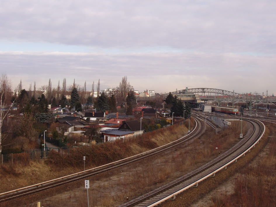 Kleingartensiedlung an der Bezirksgrenze von Berlin-Mitte, Nahe S-Bahnhof Bornholmer Straße